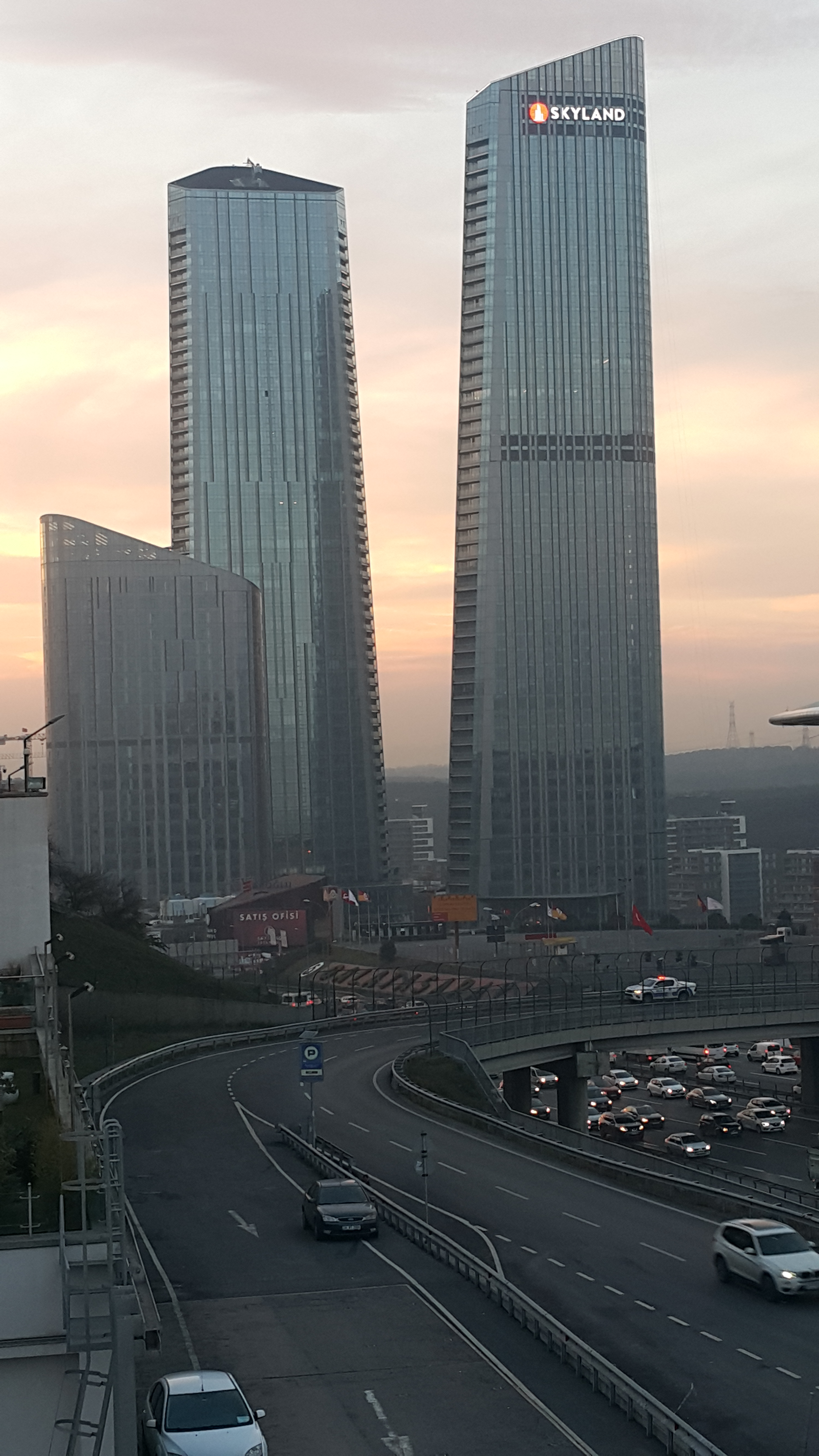 Skyland binası, Seyrantepe, İstanbul, Türkiye.